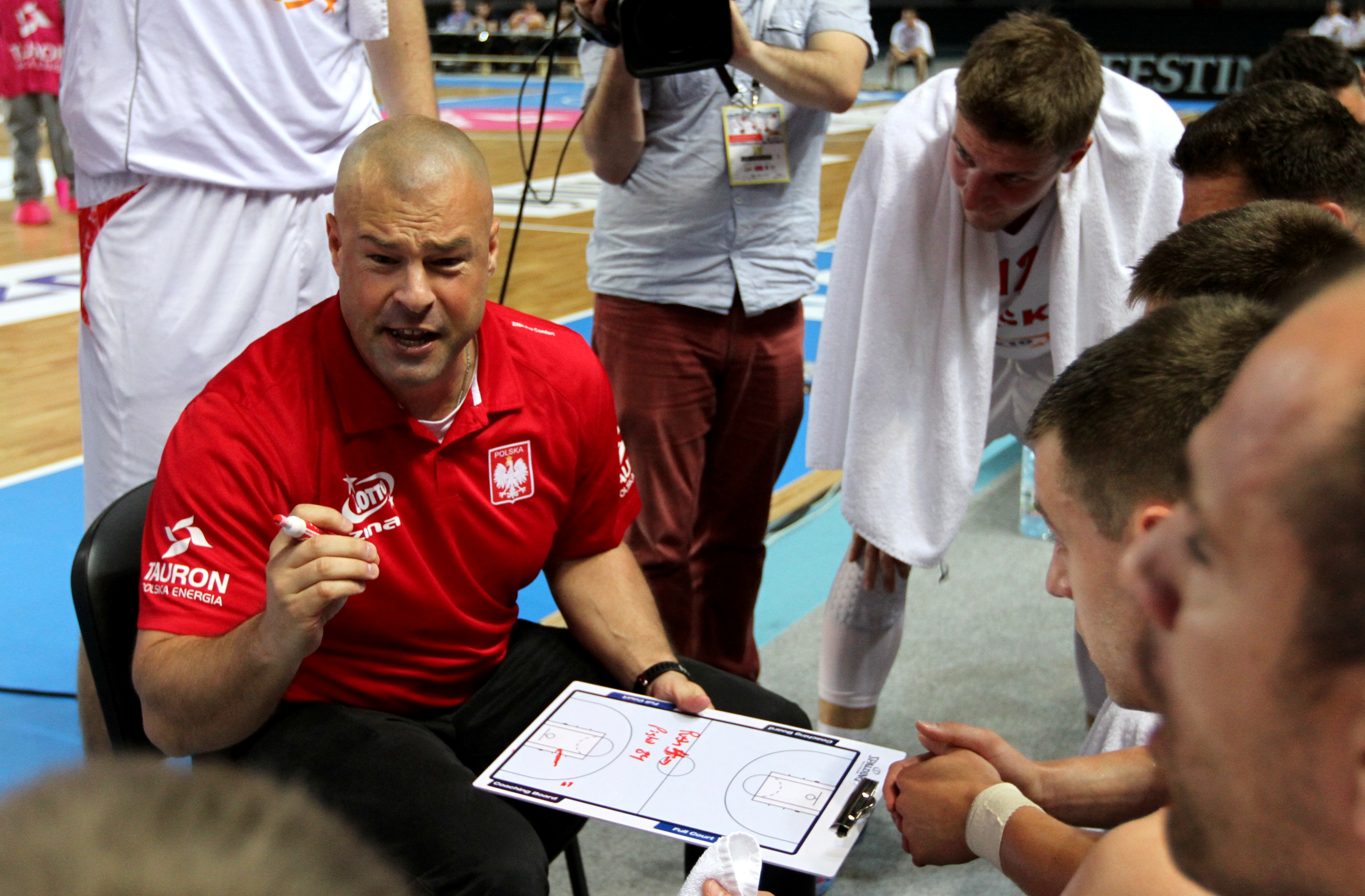 Toruń Basket Cup: Polska - Portugalia, 1 sierpnia 2014. Trener reprezentacji Polski w koszykówce Mike Taylor